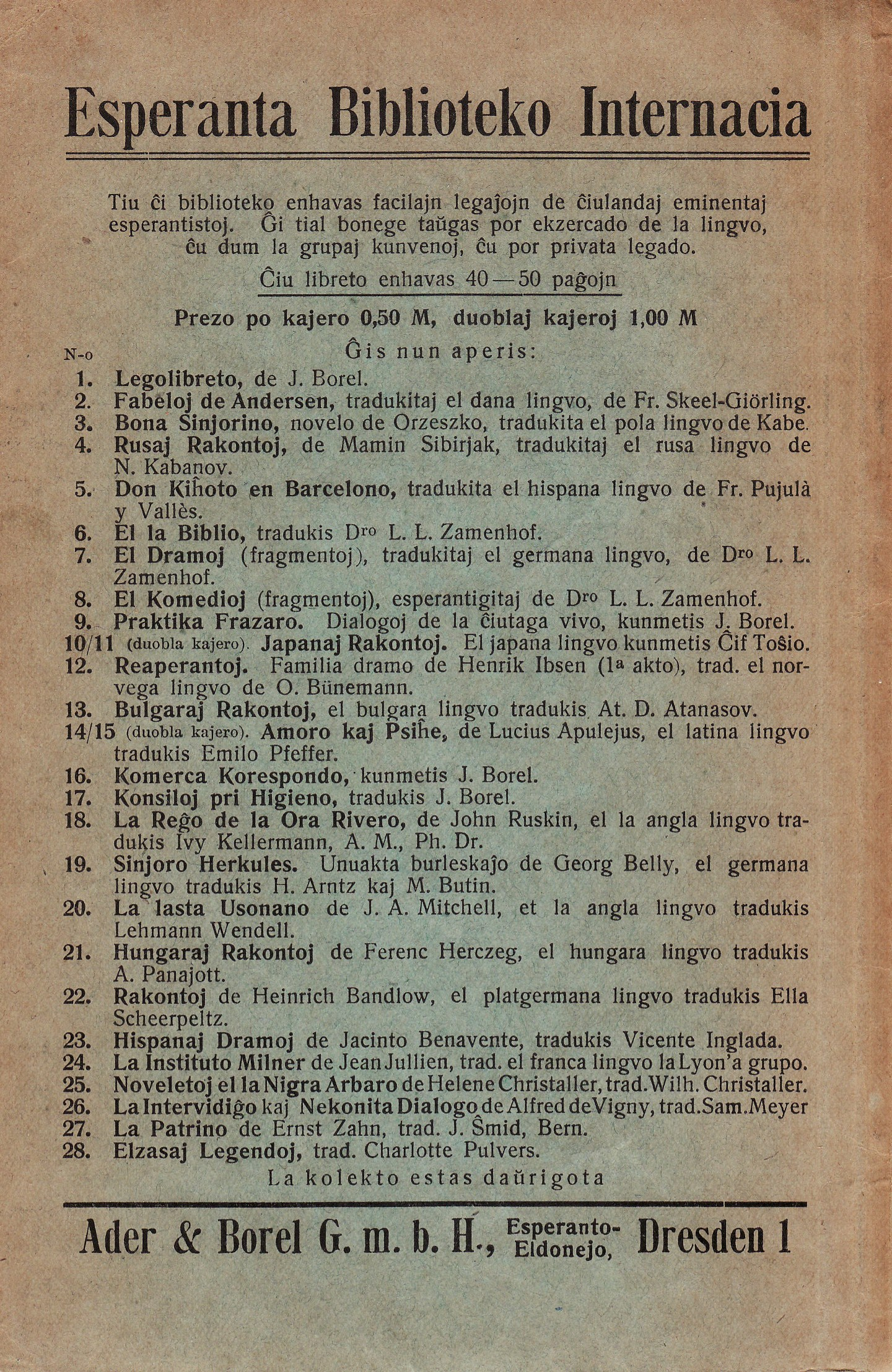 Amo per Proverboj